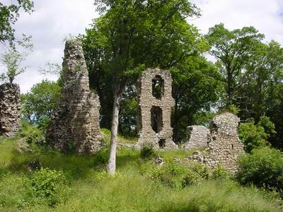 Stecklenburg Burgruine, public domain, eigenes Foto von 2004 Mewes